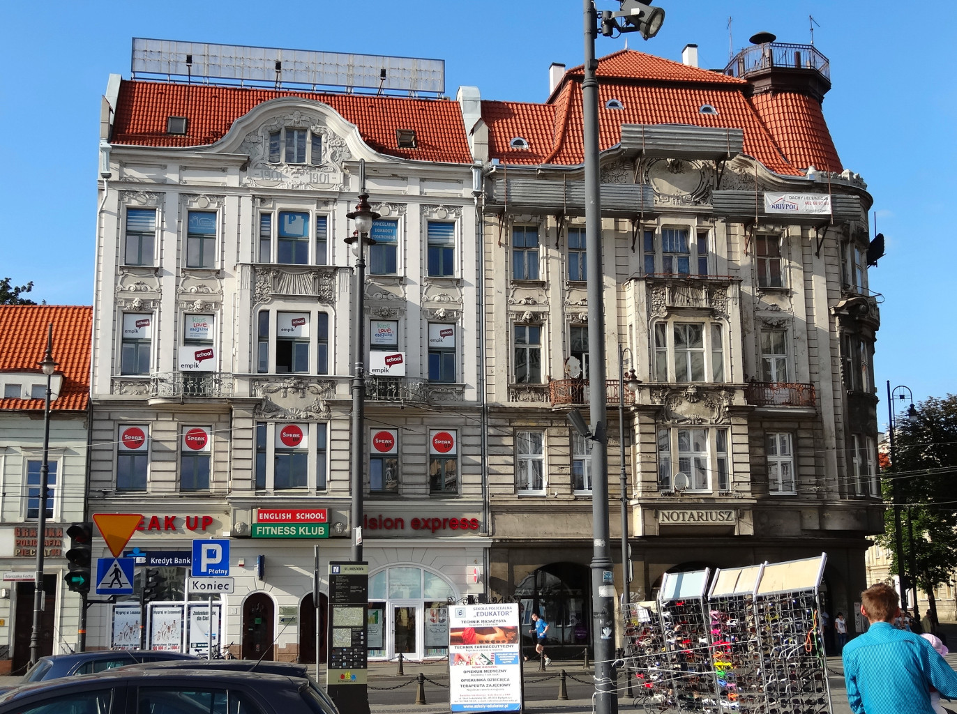 Kamienice ul. Ferdynanda Focha 2 i 4 w Bydgoszczy (1901-1902)